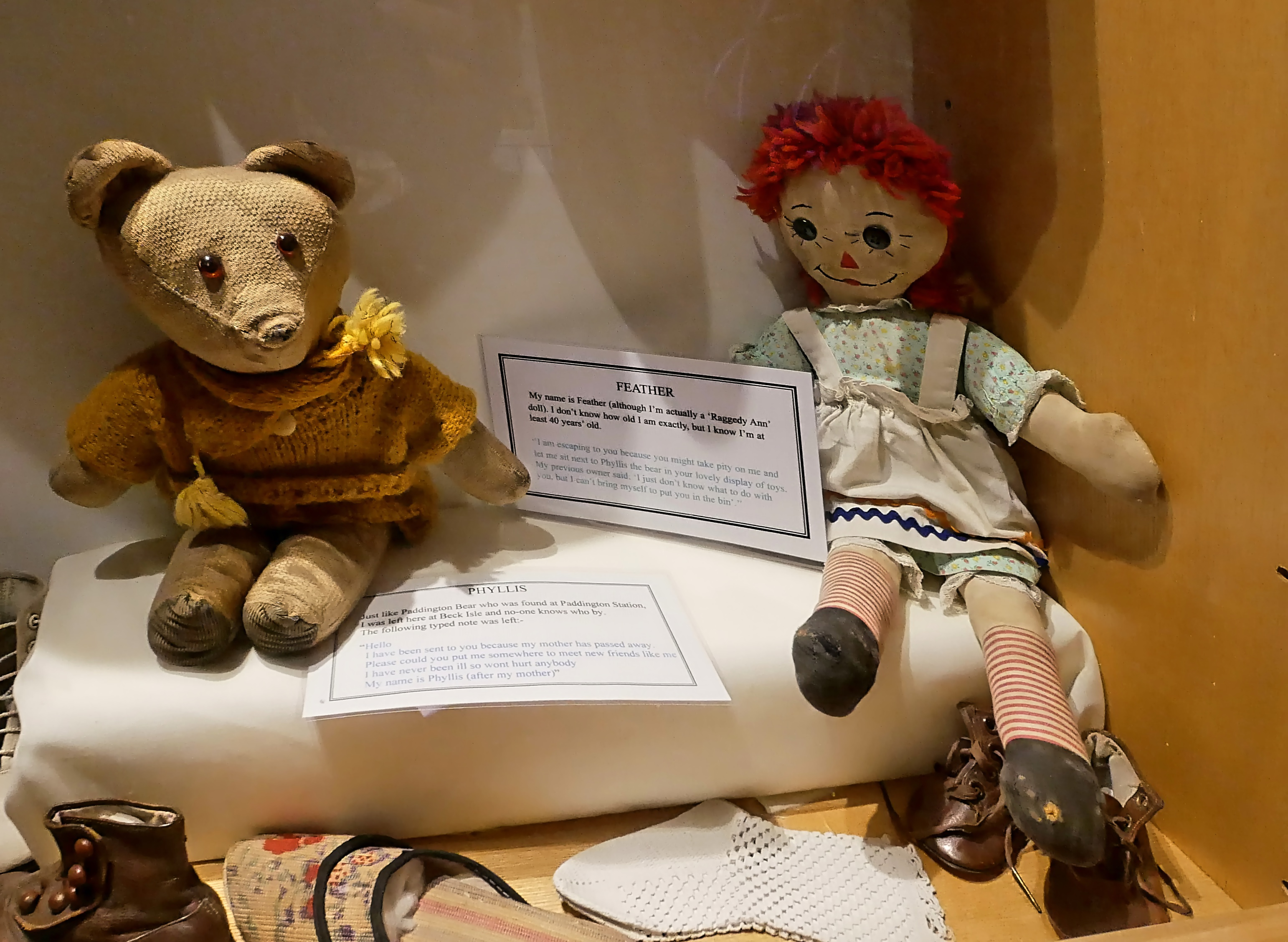 Beck Isle Museum, Pickering - puppets